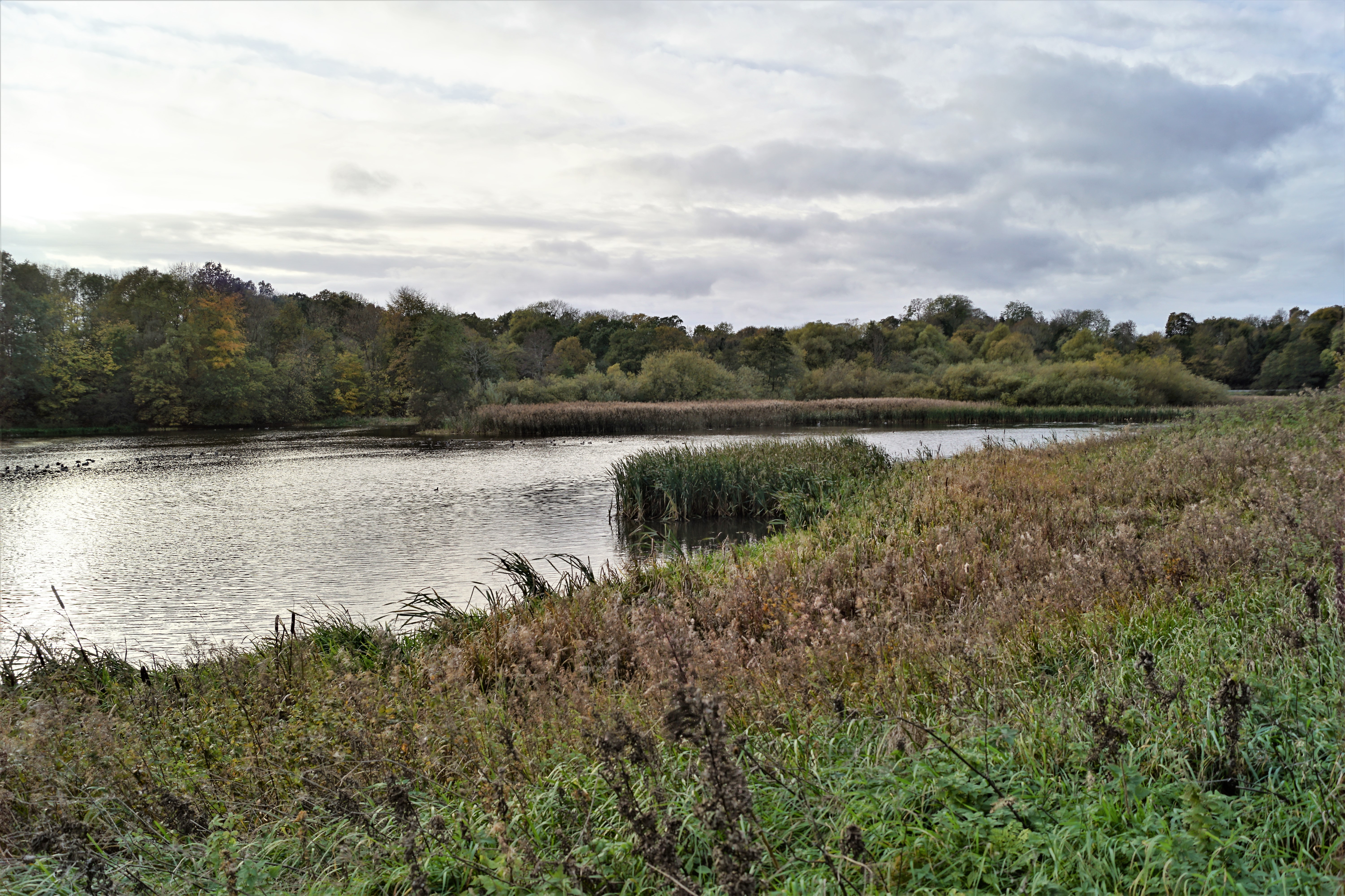 Vestenden af Bygholm Sø set mod sydvest